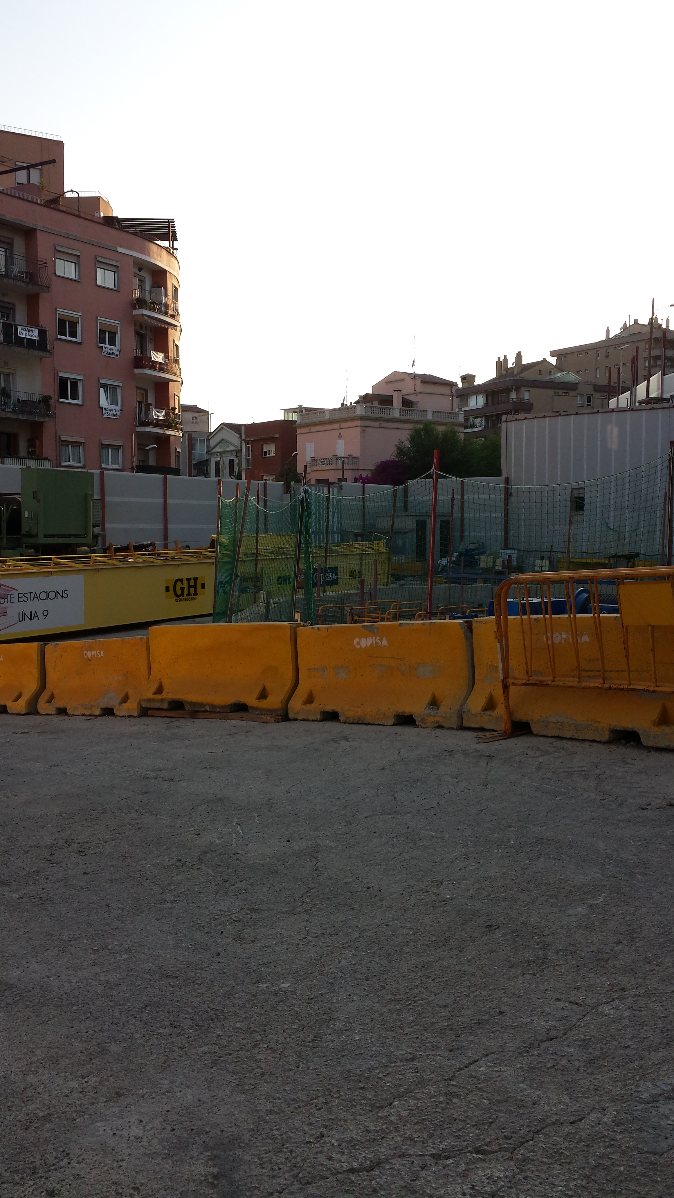 Obres de l'estació de Sanllehy al juliol de 2013